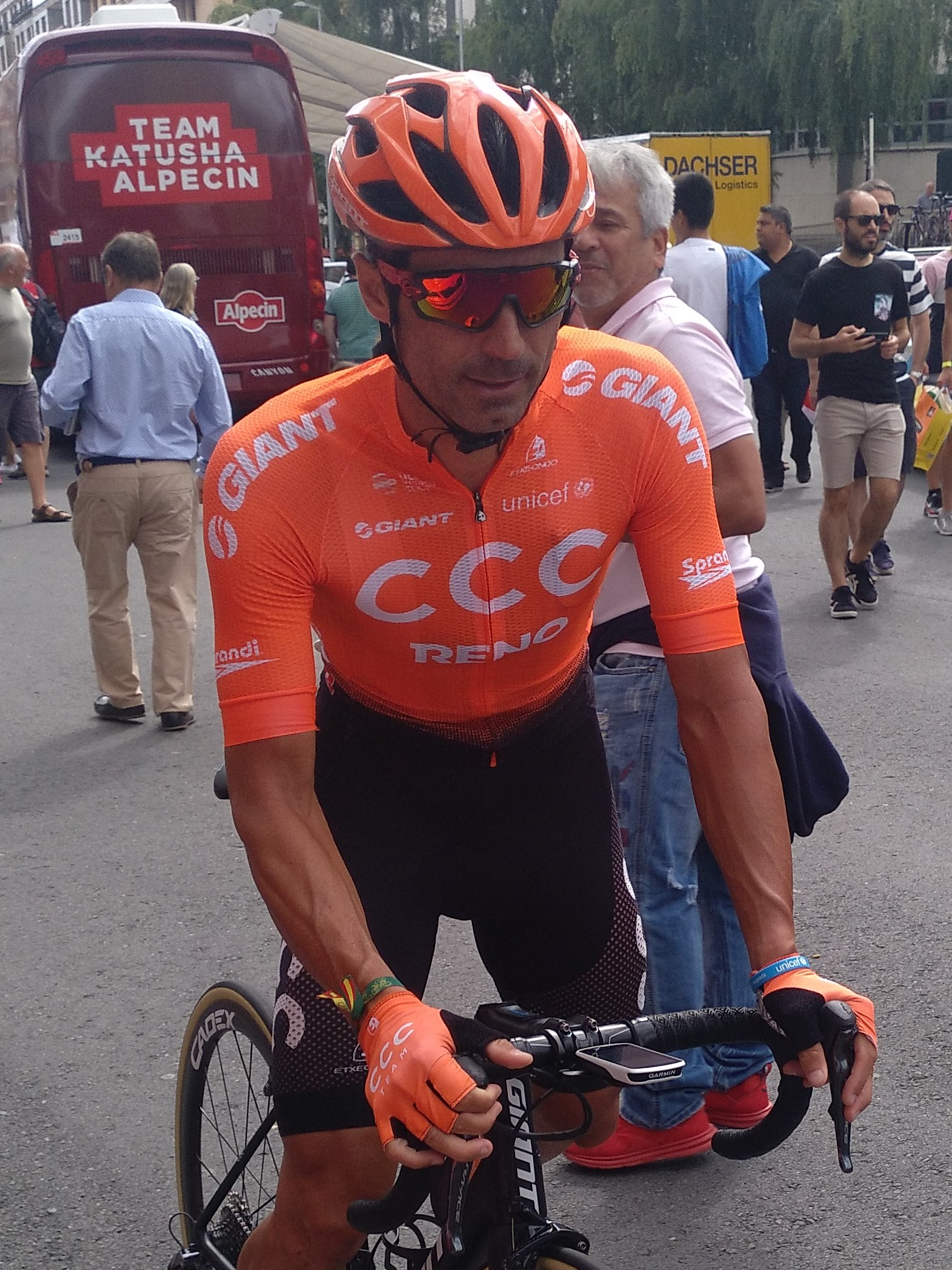 Francisco Ventoso, del equipo CCC, en la salida en Bilbao en la 13ª etapa de la Vuelta a España 2019